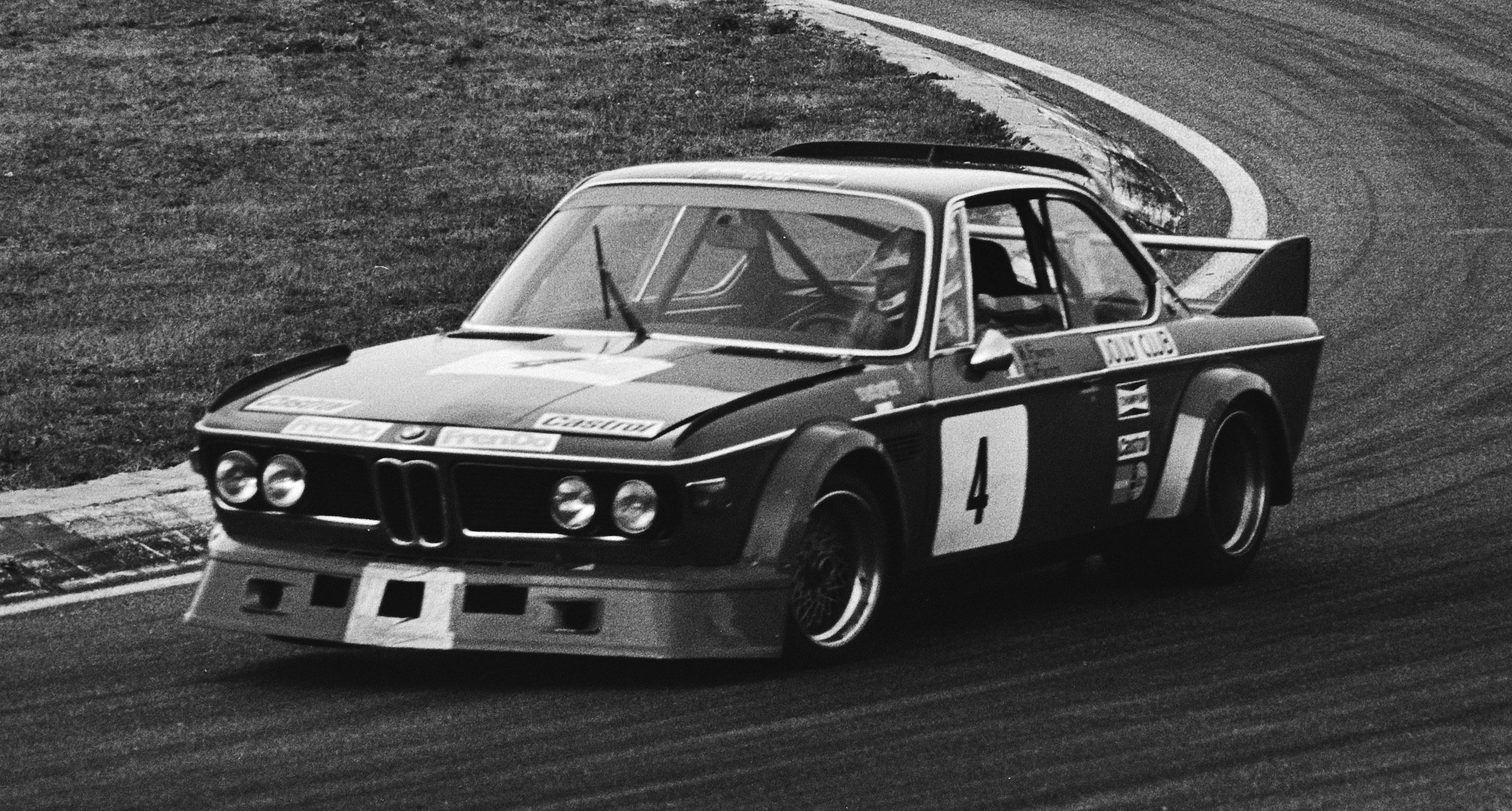 Collectie / Archief : Fotocollectie Anefo Reportage / Serie : [ onbekend ] Beschrijving : Zandvoort Trophy 4 uursrace voor toerwagens; Facetti met BMW op kop (nr. 4), gevolgd door Grano/Joosen eveneens met BMW Datum : 5 augustus 1979 Locatie : Noord-Holland, Zandvoort Trefwoorden : autoraces Fotograaf : Croes, Rob C. / Anefo Auteursrechthebbende : Nationaal Archief Materiaalsoort : Negatief (zwart/wit) Nummer archiefinventaris : bekijk toegang 2.24.01.05 Bestanddeelnummer : 930-3860